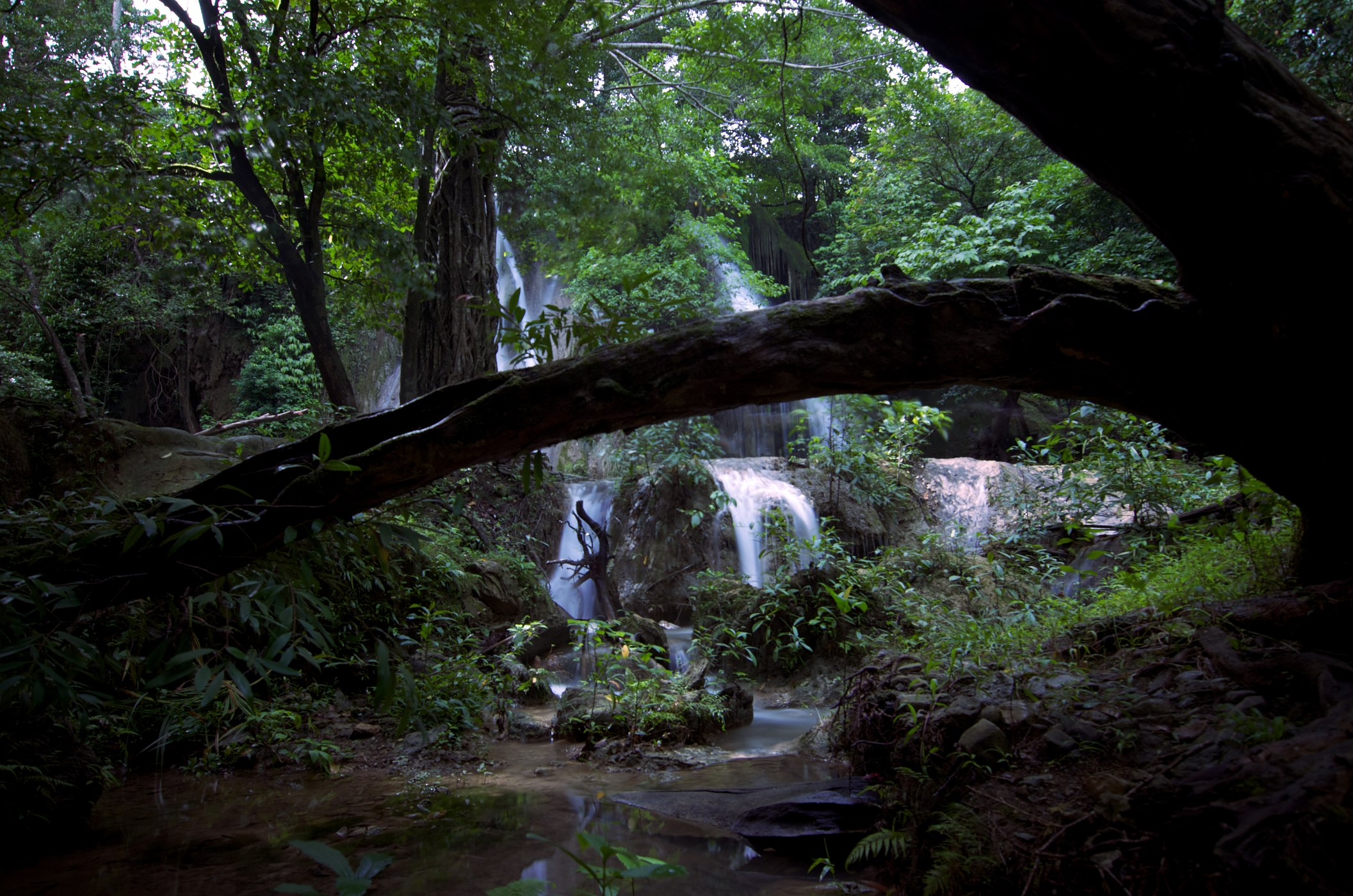 Batlag Falls Tanay, Rizal, Philippines